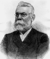 zeitgenössisches Portrait des 1895 verstorbenen deutschen Industriellen Hermann Gruson